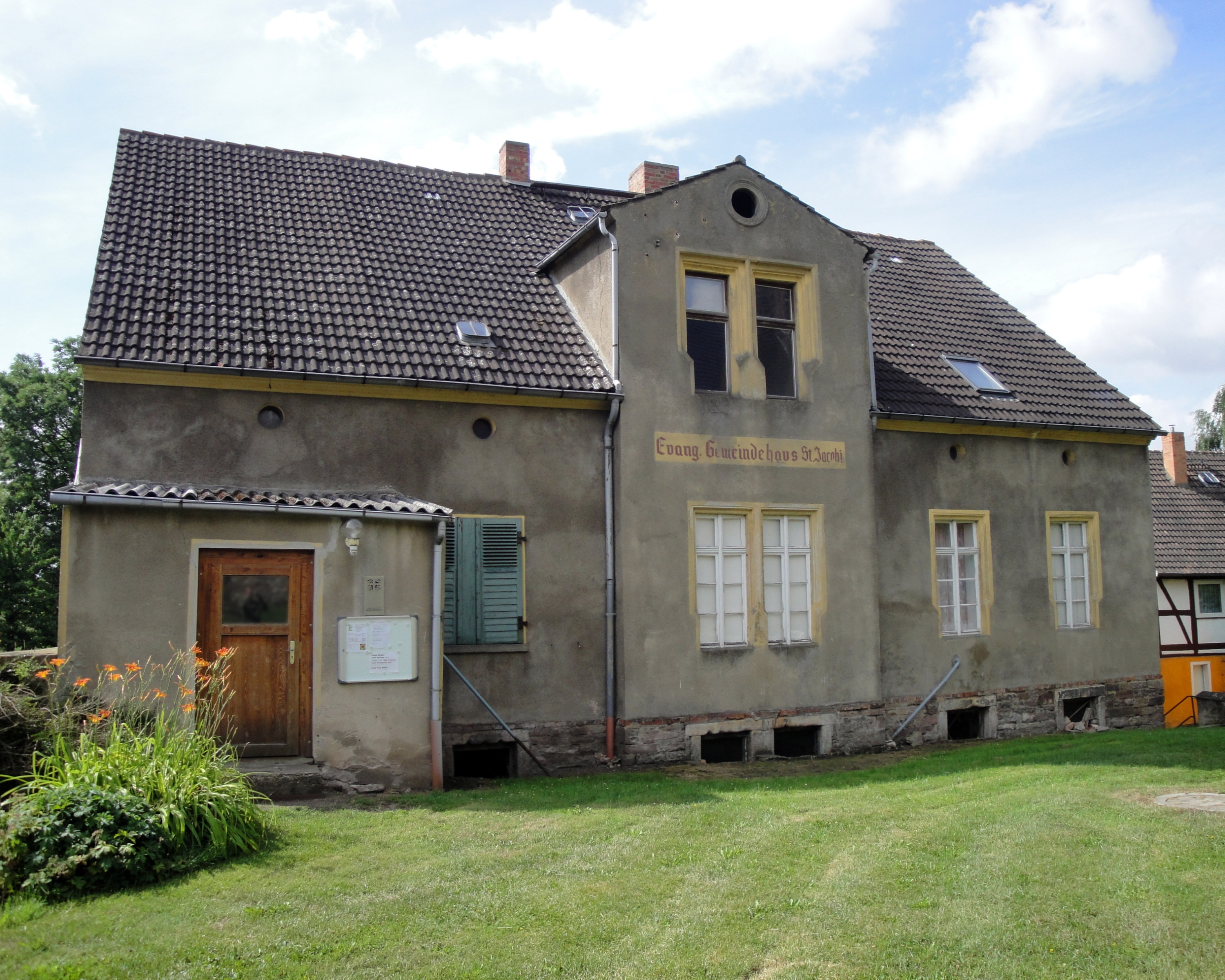 Evangelisches Gemeindehaus in Dreileben, Sachsen-Anhalt